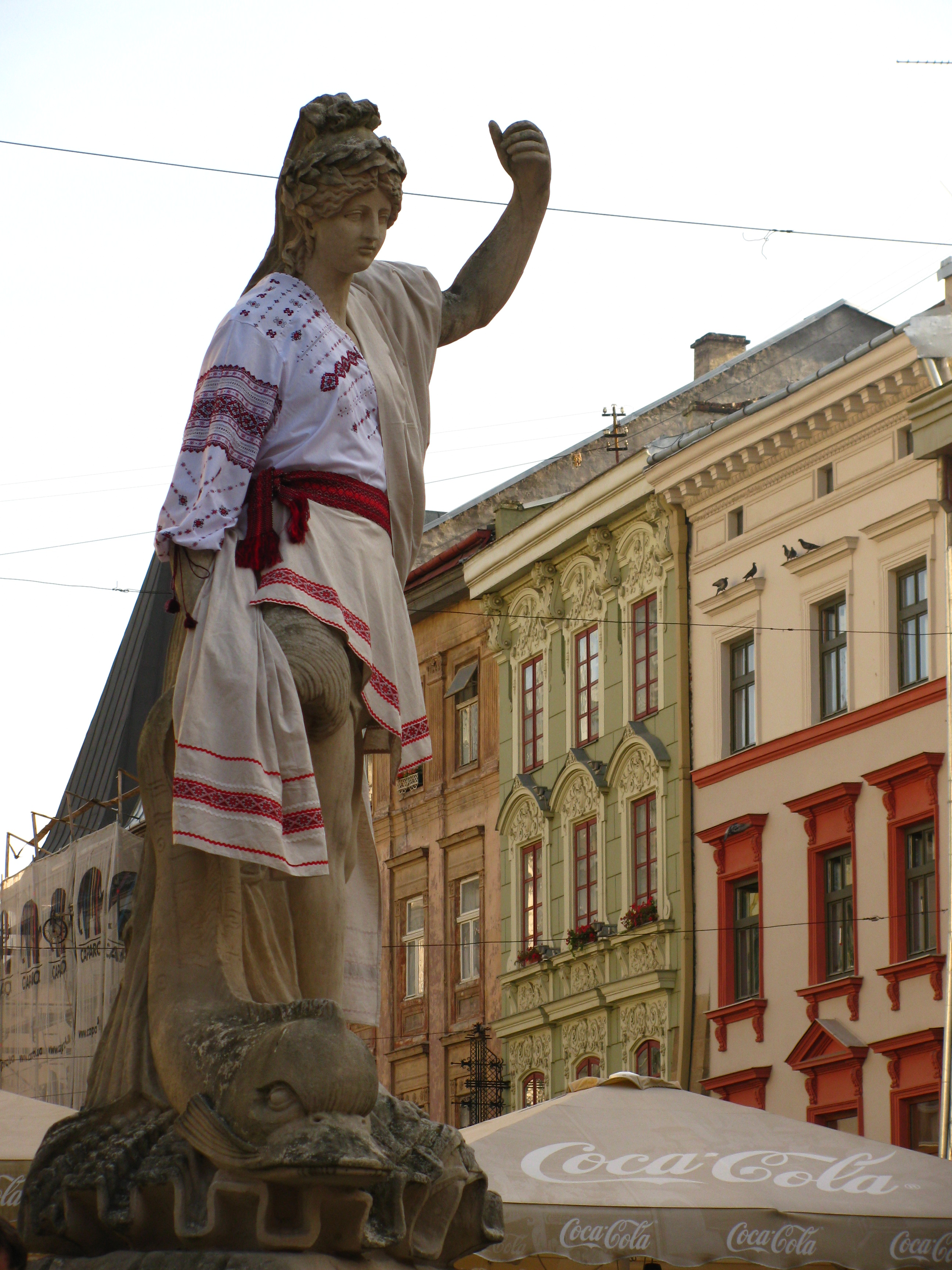 Діана в вишиванці.jpg: Скульптура одного з фонтанів площі Ринок у Львові - Діана - вбрана у вишиванку з нагоди Дня Незалежності україни